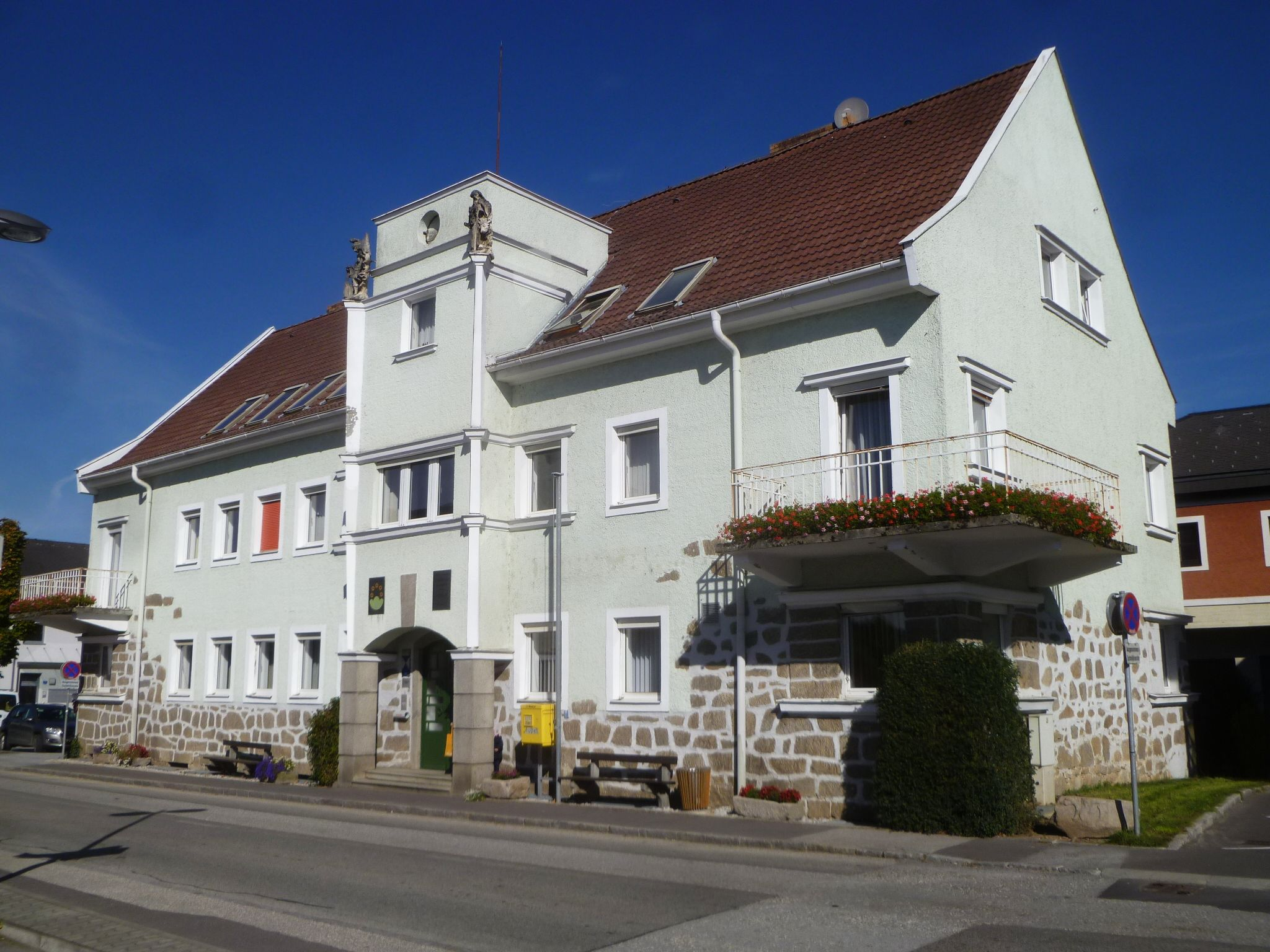 Gemeindeamt